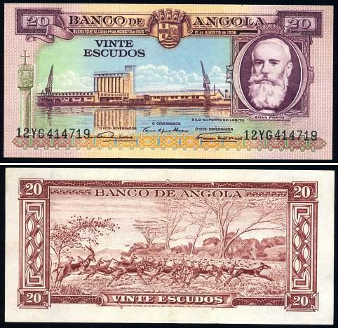 ANG20(1956)f Angola 20 Escudos 15 Agosto 1956 Silva Porto